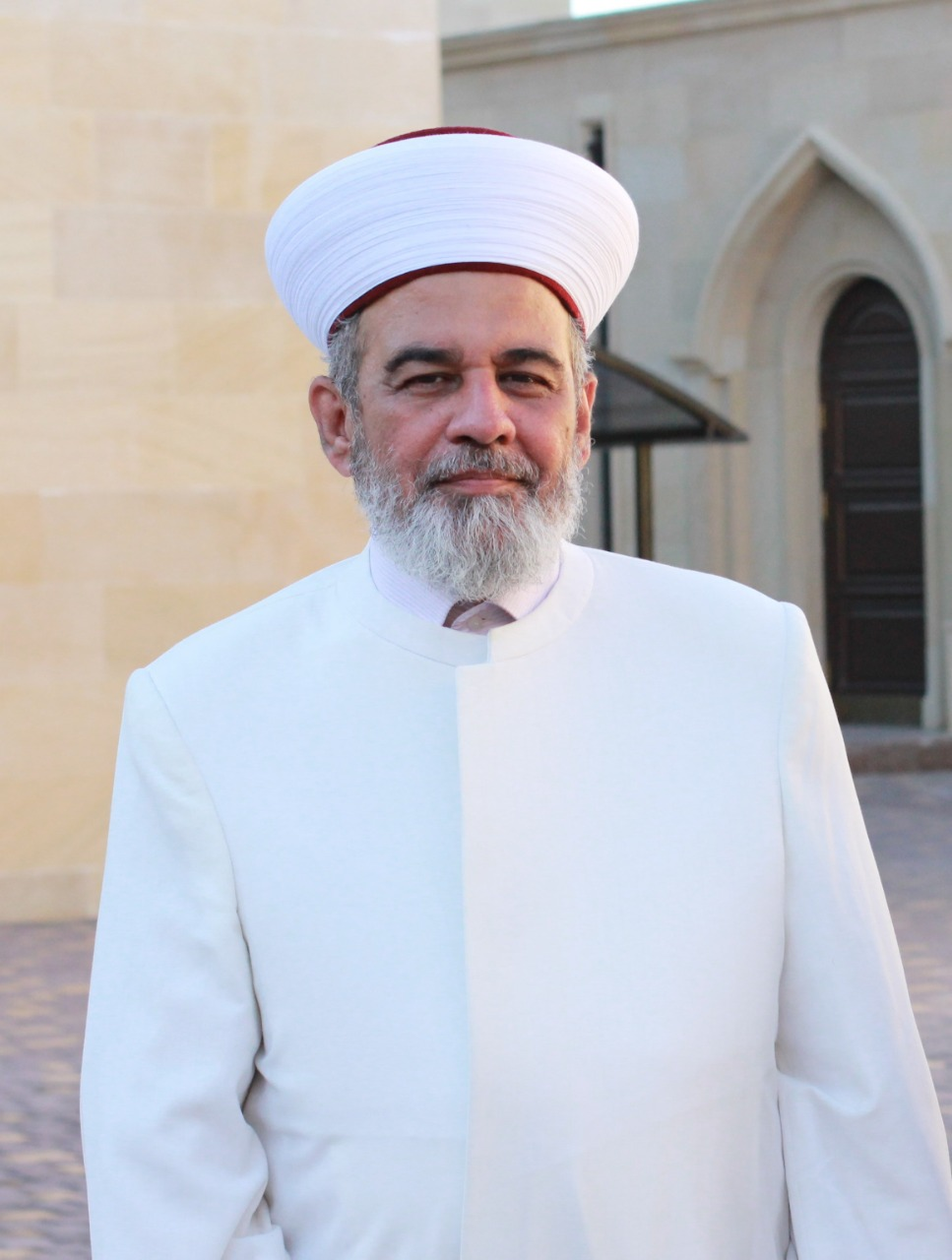 Председатель Духовного управления мусульман Украины Верховный Муфтий Украины шейх Ахмед Тамим